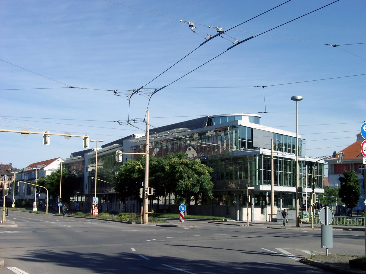 Esslingen. Neubau der FHTE in der Kiesstraße.